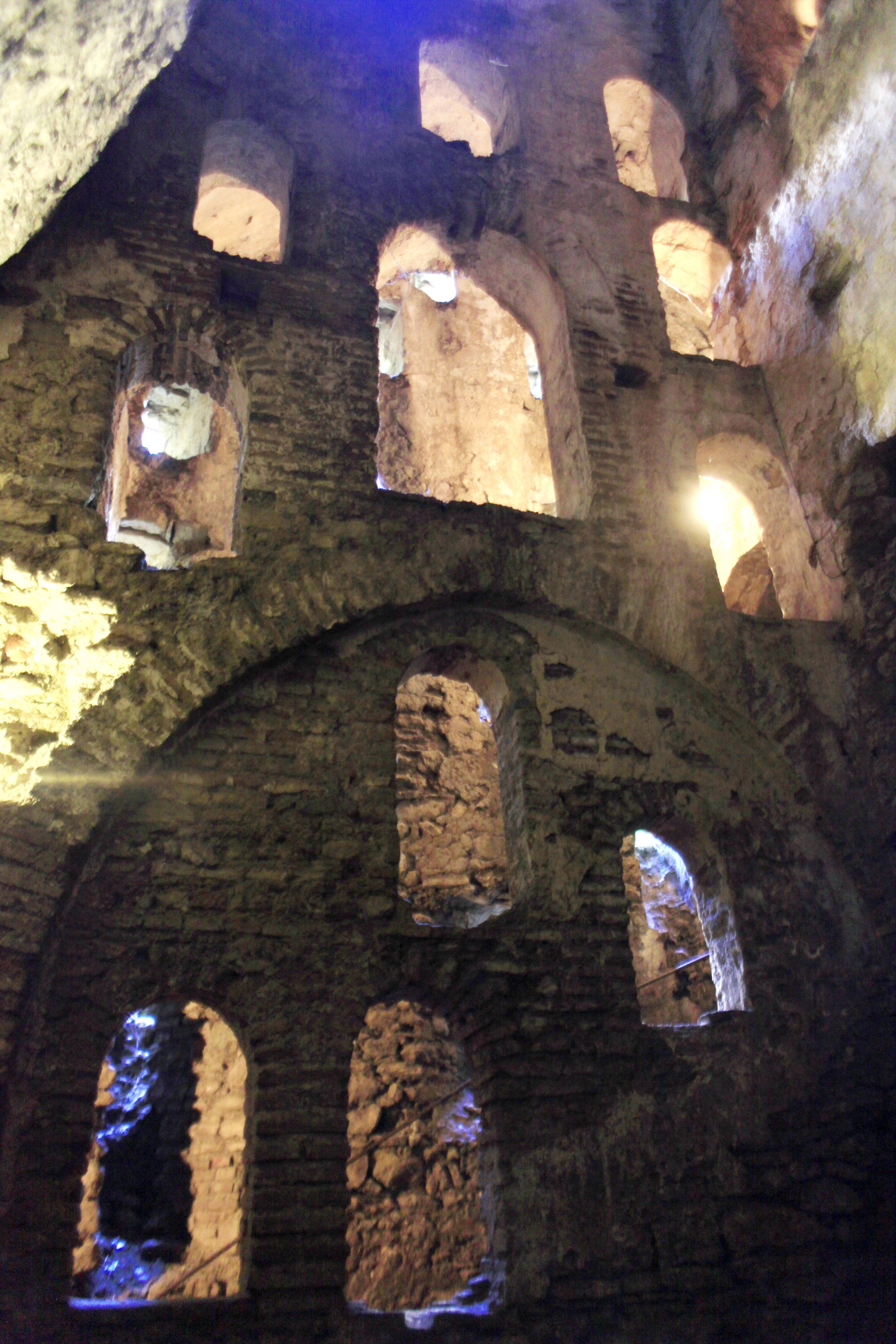 La Sala de Armas llamada así por albergar la gran noria usada para extraer el agua.